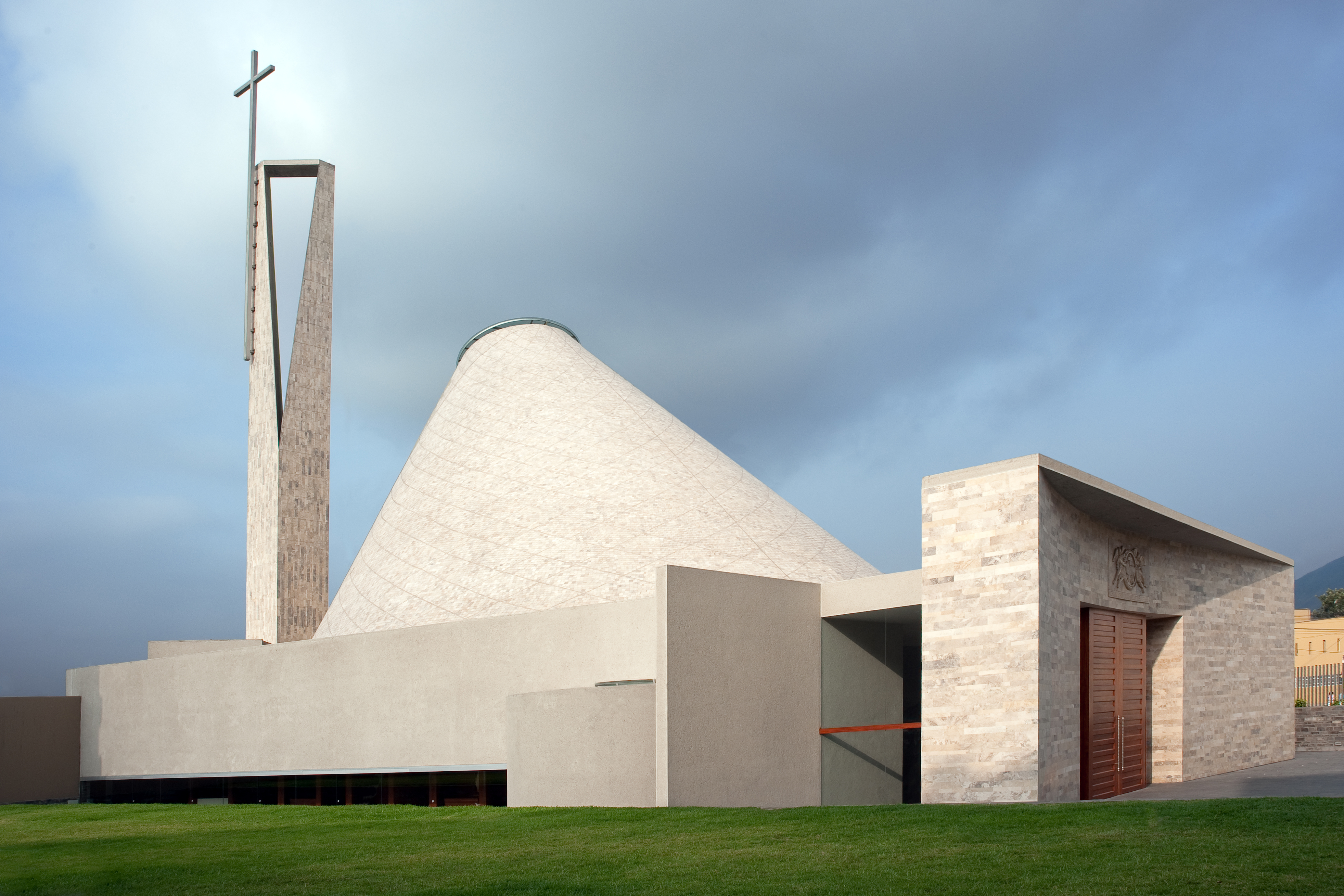 Fachada oeste e ingreso principal, Alfredo Benavides y Cynthia Watmough, Ruth Alvarado y Oscar Borasino.